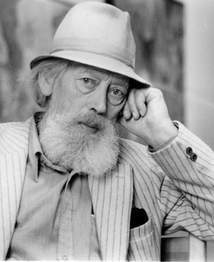 Hans Kristian Ziegler, norsk billedkunstner og utstillingsleder for Riksgalleriet.